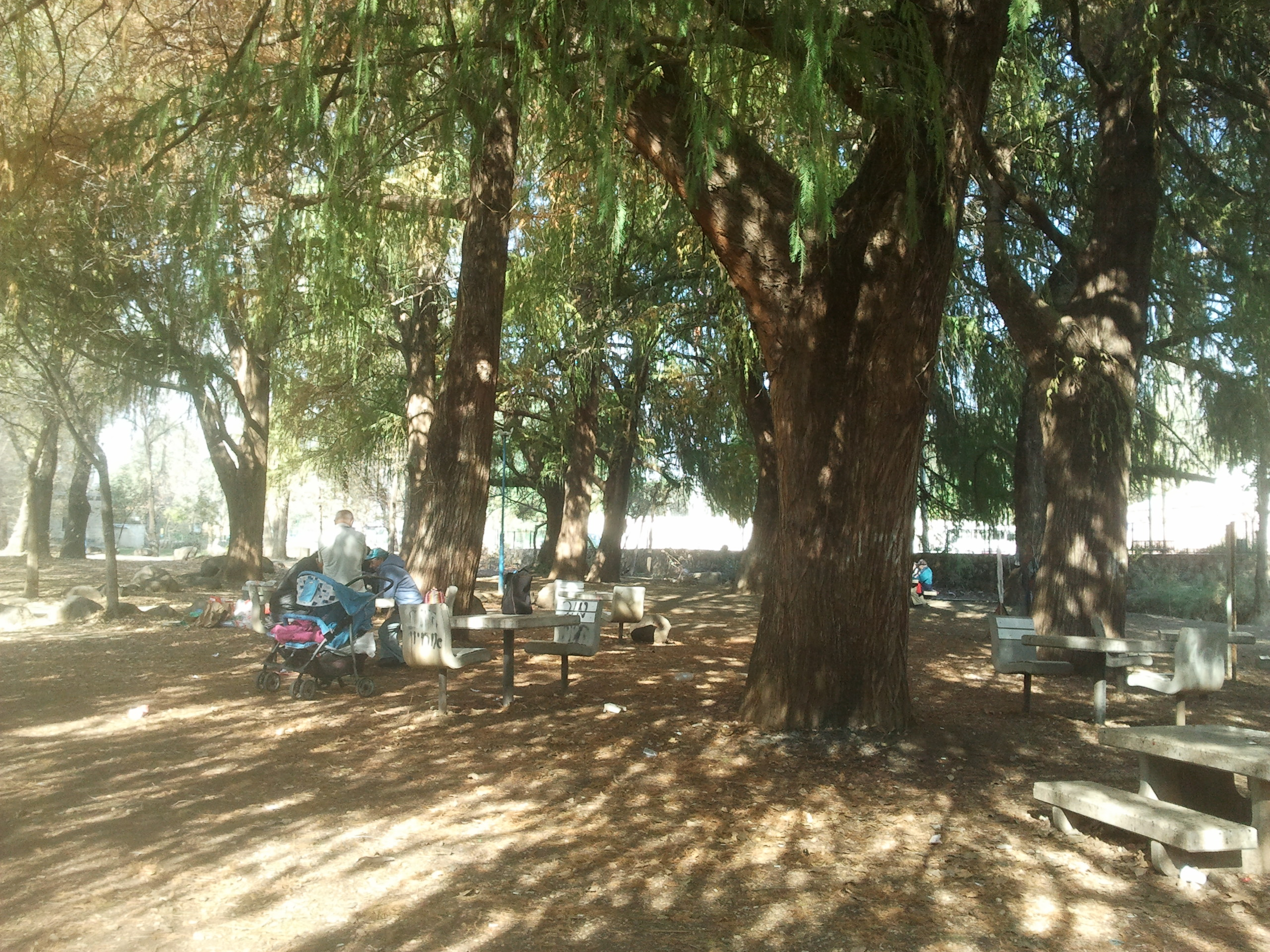 פארק הזהב הוא הפארק המרכזי העירוני בקרית שמונה. בתוכו זורם נחל עין זהב חורשת עצי ענק מהמין טכסודיון דו-טורי